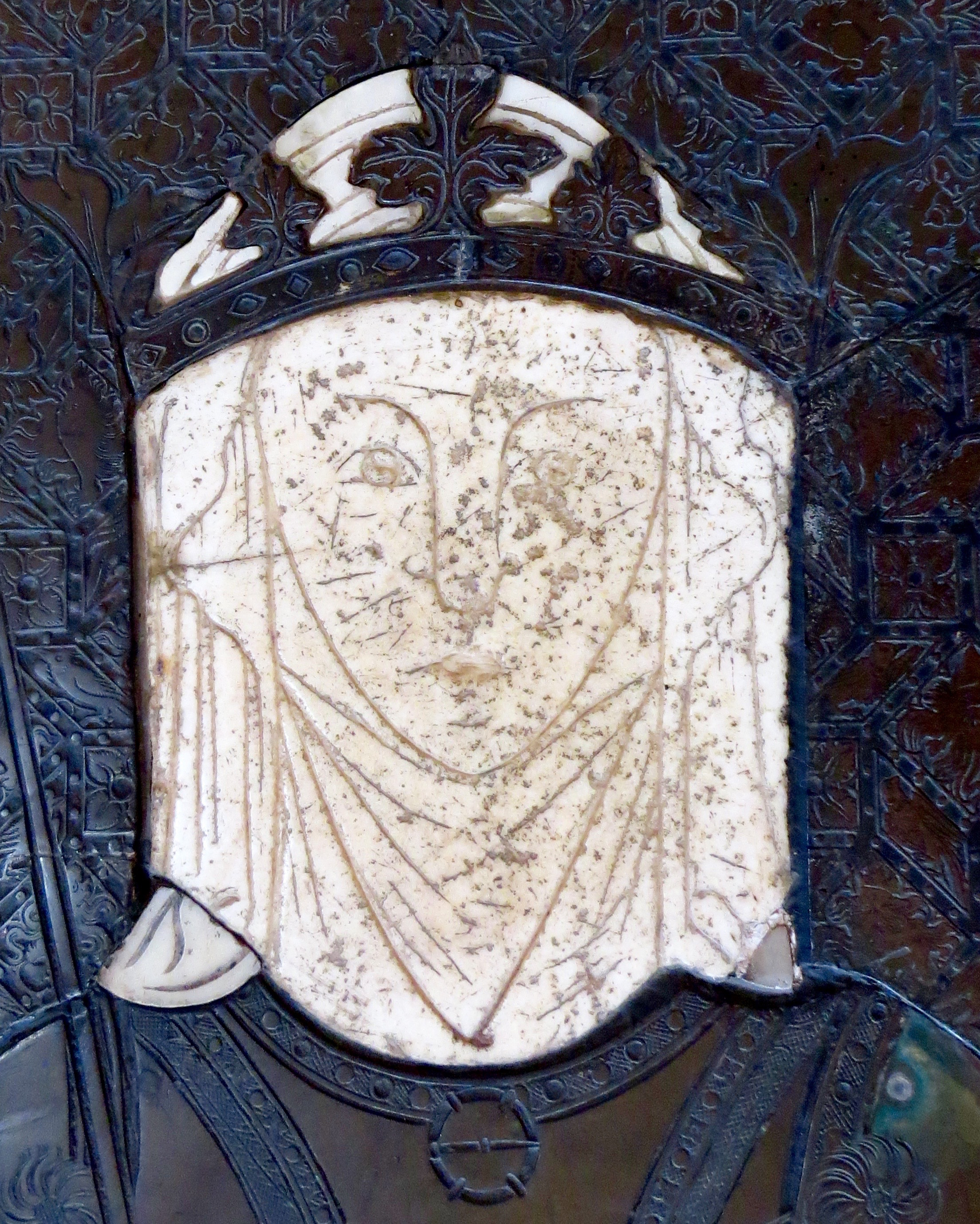 Detalje fra Ingeborg Magnusdatters grav i Sankt Bendts Kirke, Ringsted, Sjælland